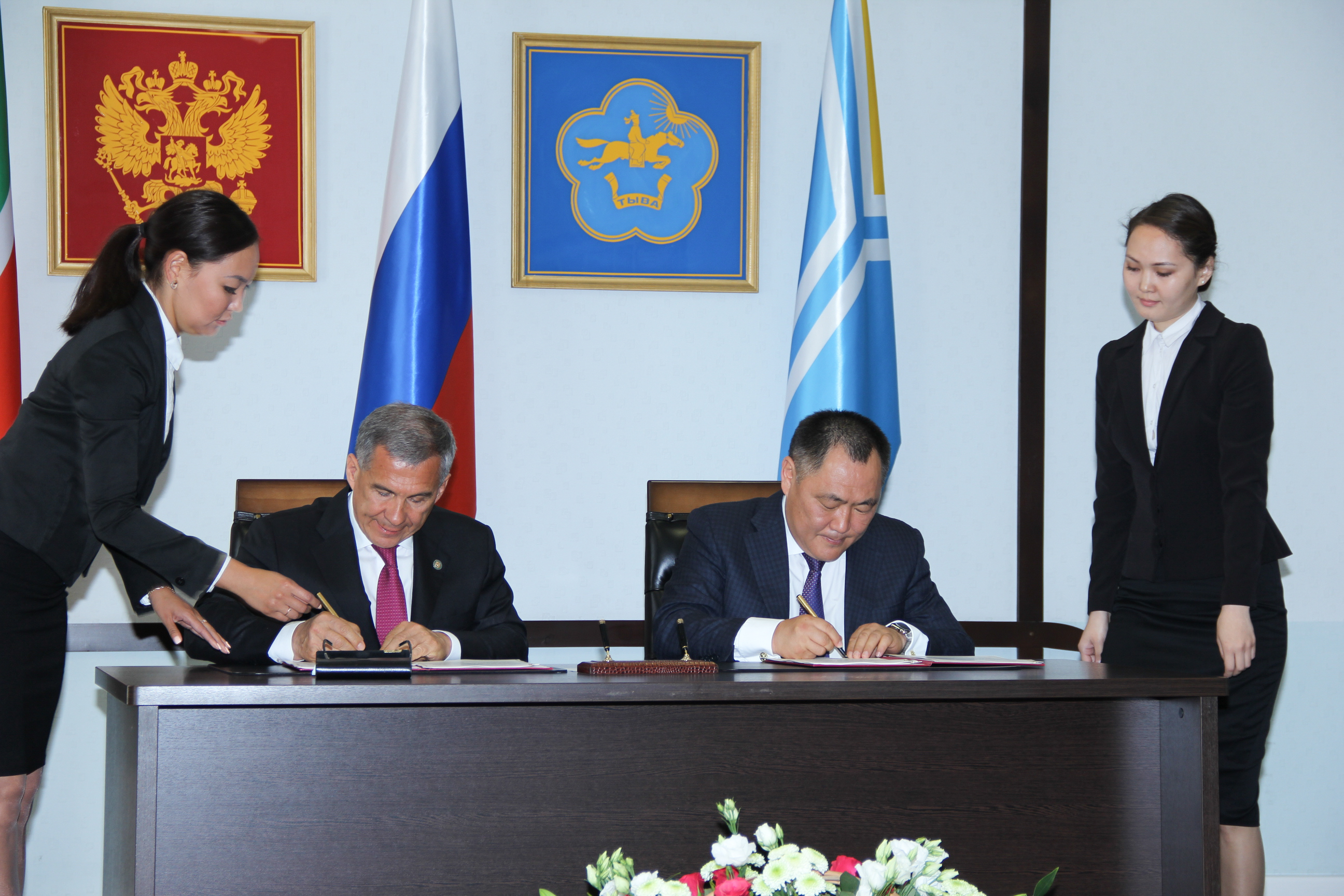 Визит делегации Республики Татарстан